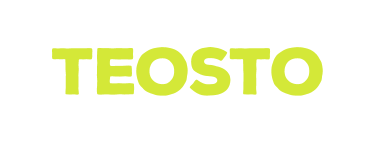 Teoston nykyinen logo